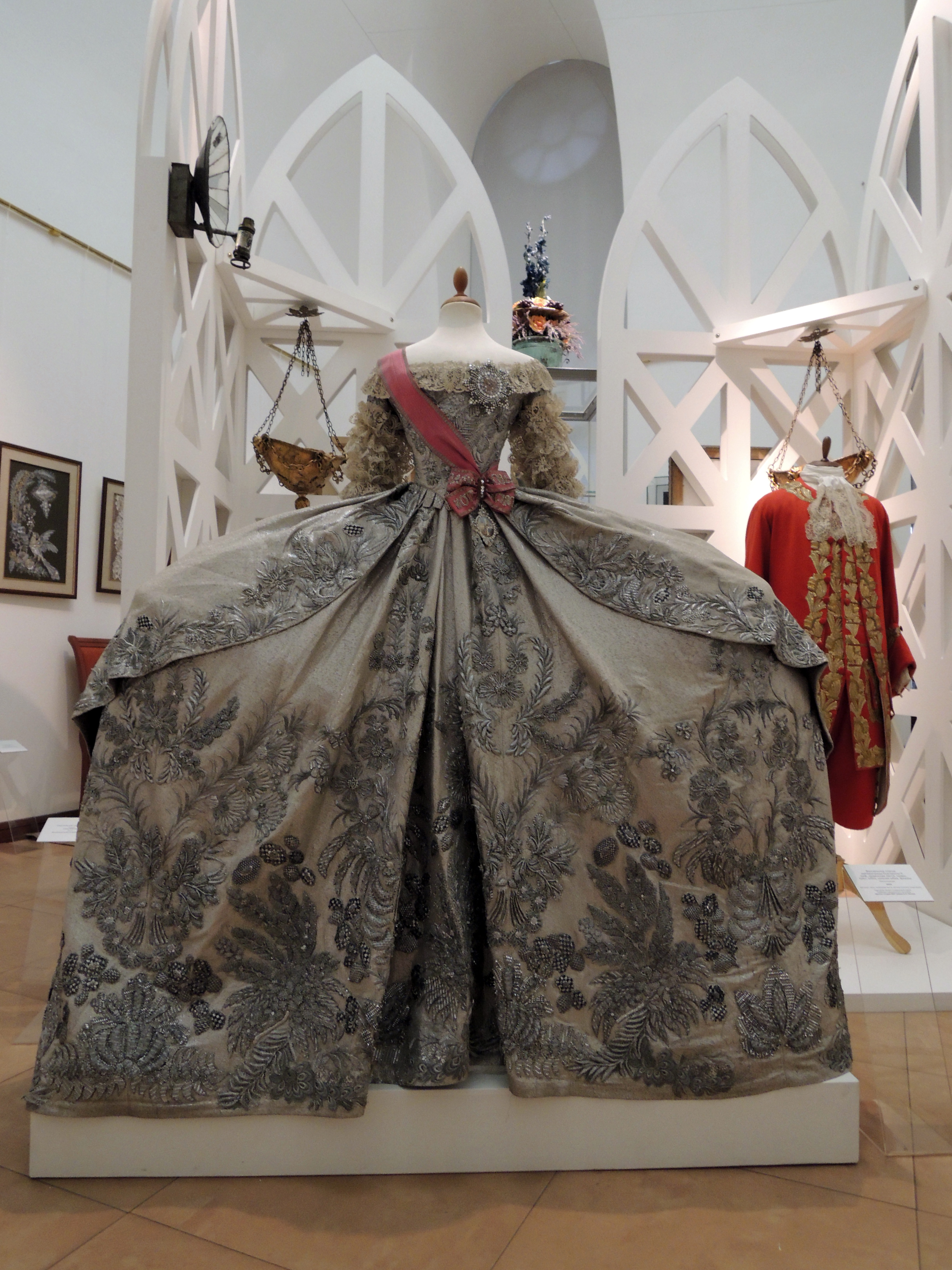 Венчальное платье великой княгини Екатерины Алексеевны (будущей императрицы Екатерины II). Реплика с оригинала 1745 года в Оружейной палате. Изготовлена: кафедра сценического костюма, Школа-Студия МХТ. Глава кафедры - Элеонора Петровна Маклакова